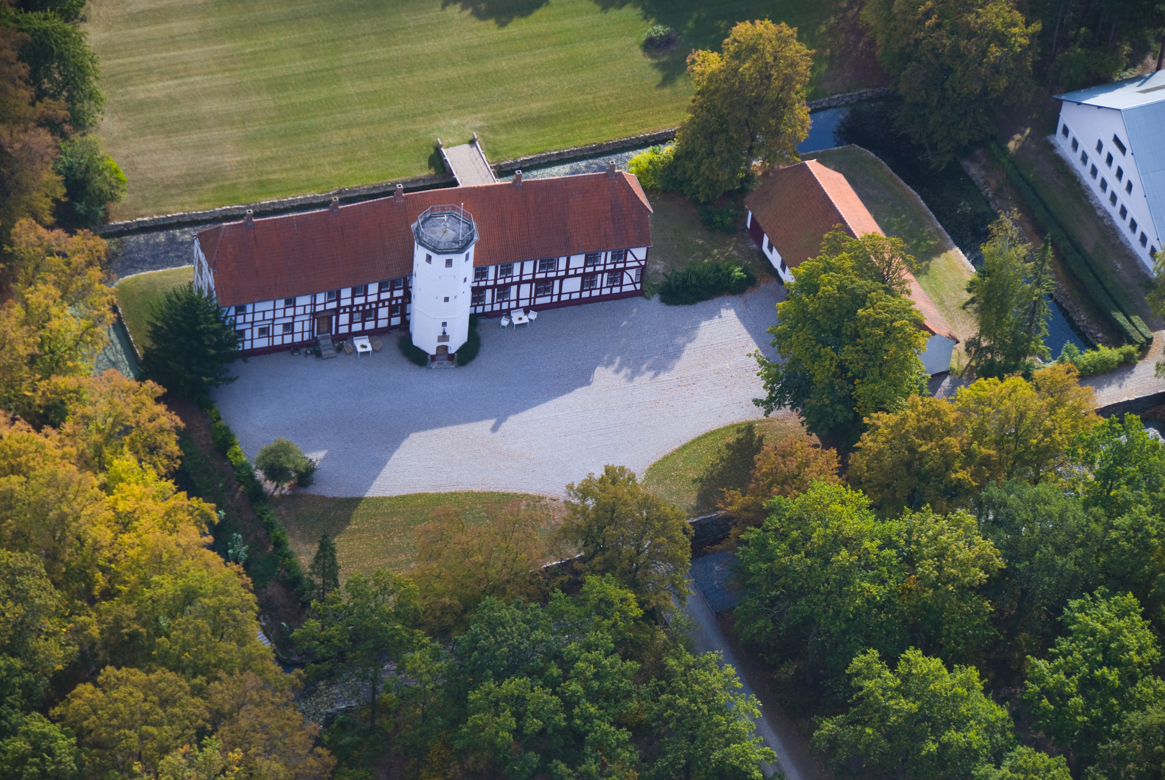 Rudbjerggaard